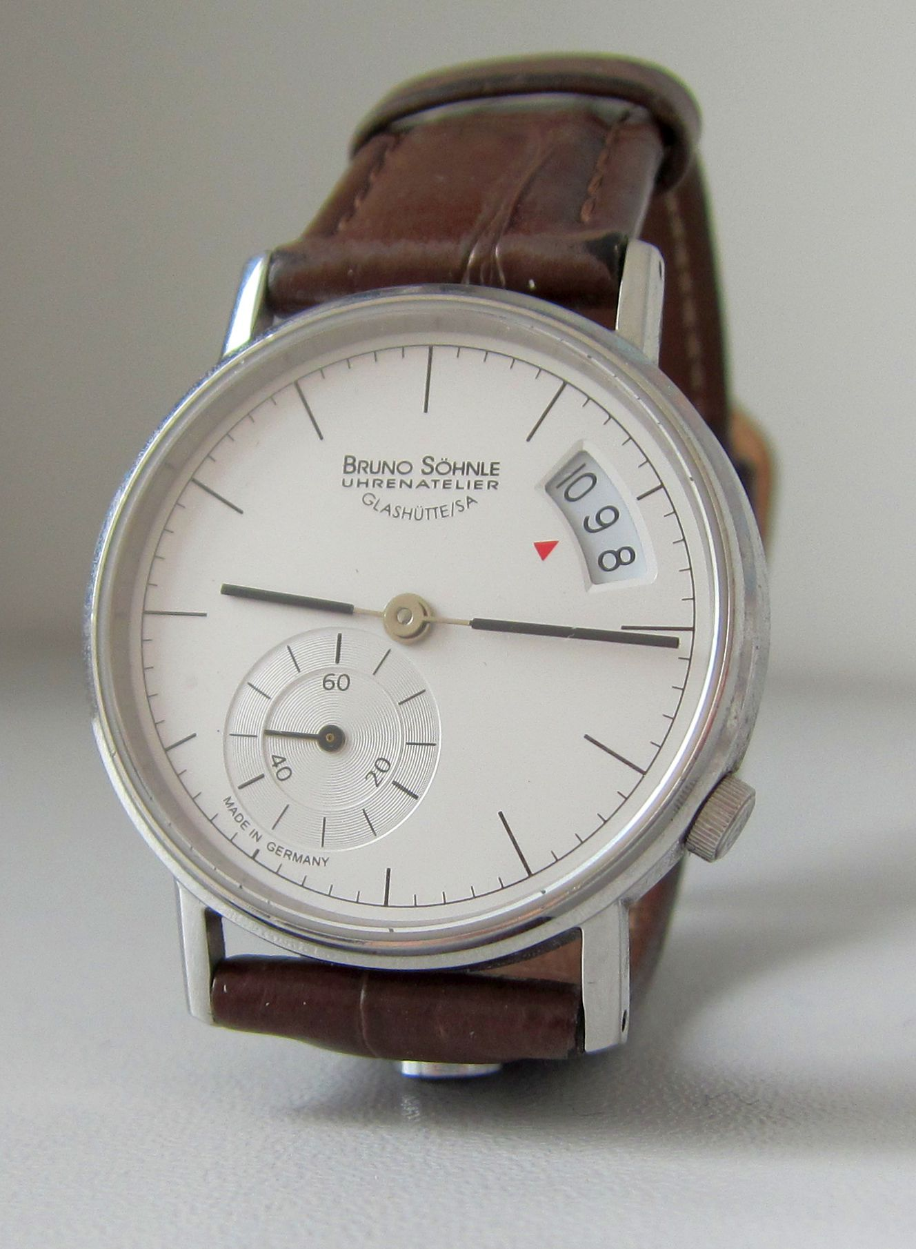 Artikelnummer 17-13053-241, Werk: Ronda 1009 (BS-Version), Gehäuse: Edelstahl, Ø 38,0 mm, Saphirglas, Kalbslederband